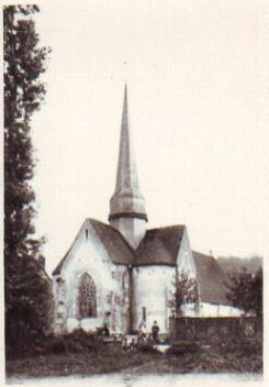 Eglise de La Ferté-Loupière - Yonne - France - vers 1900